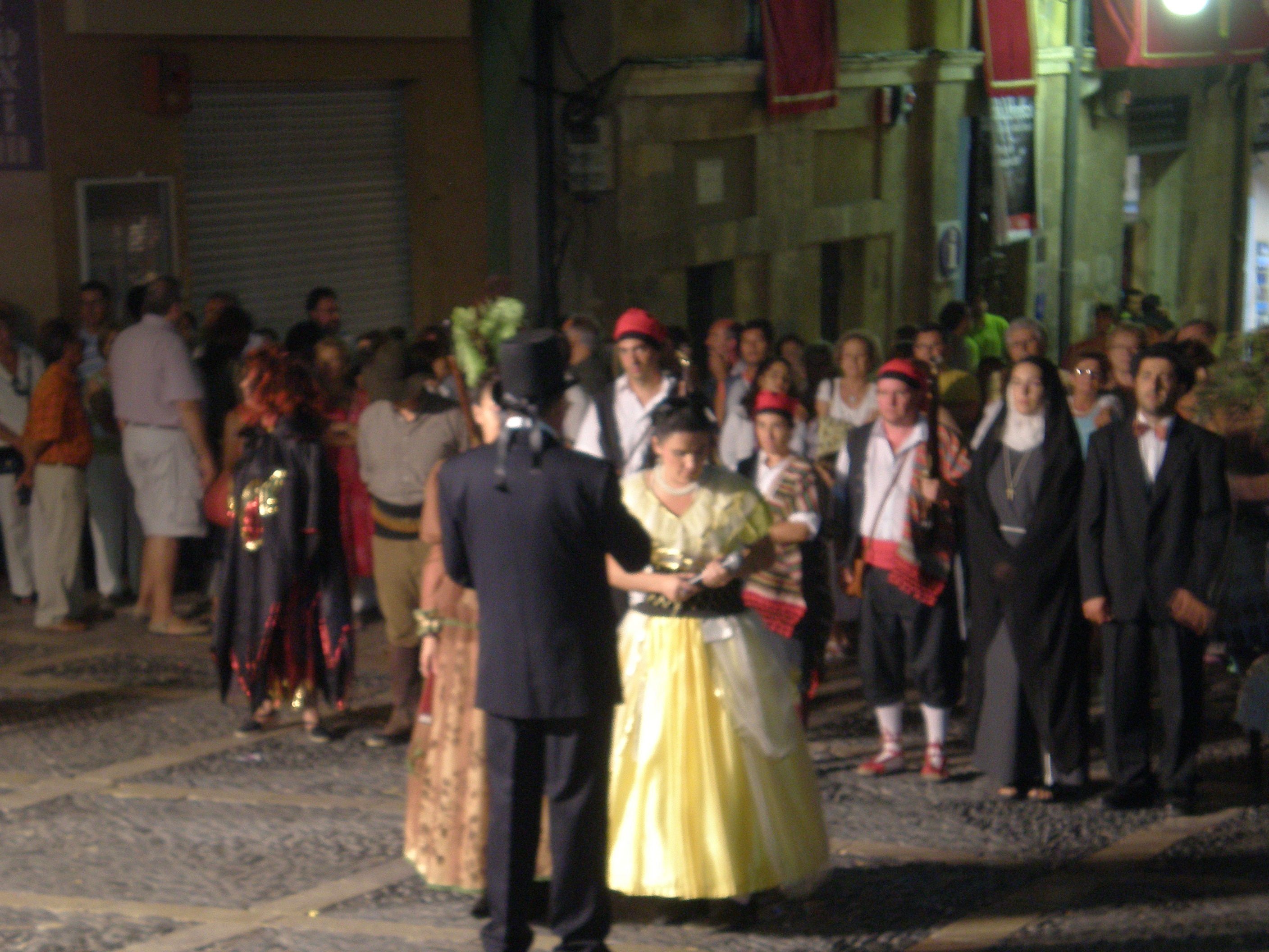 Ball de la Rosaura